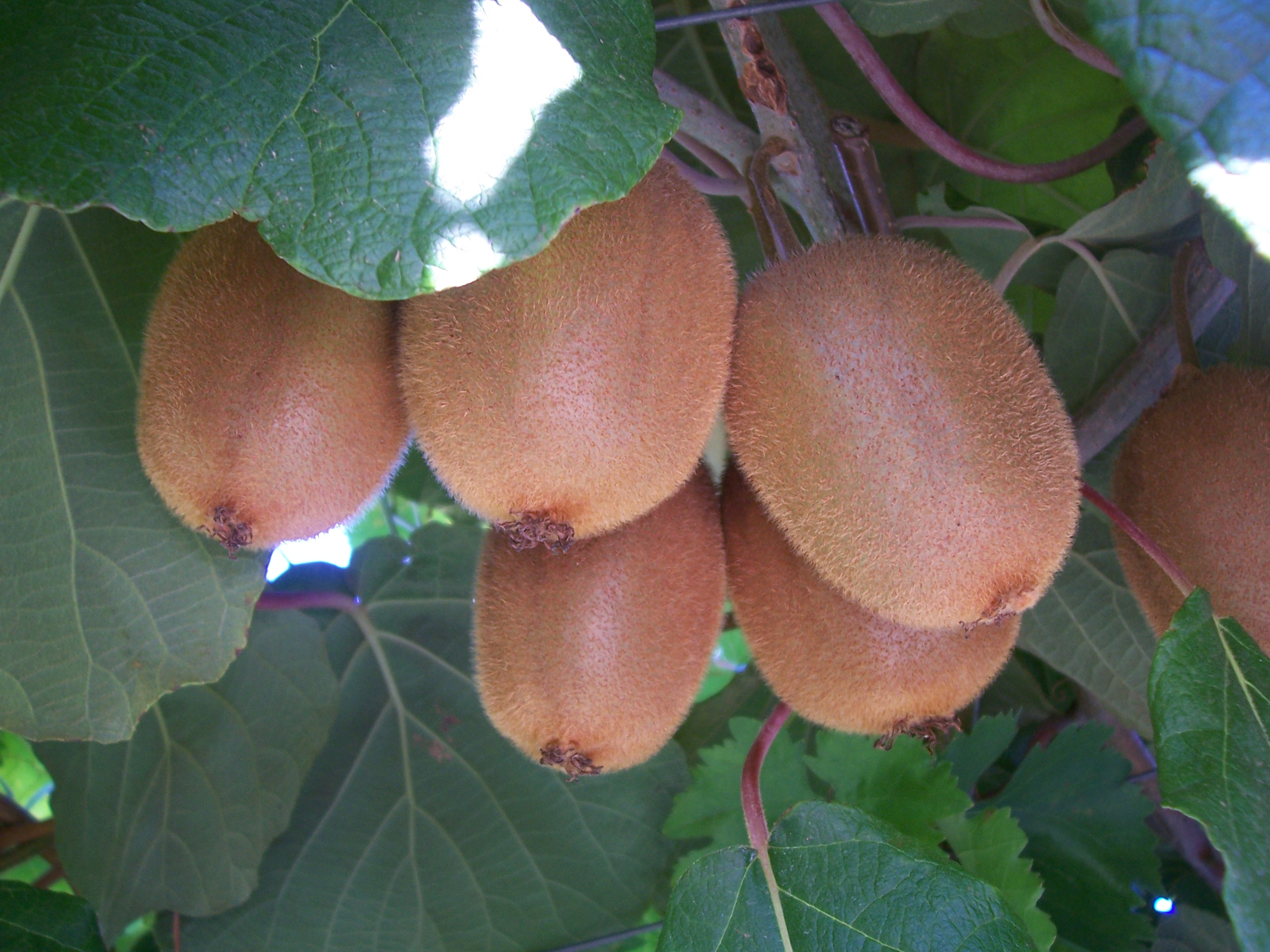 Kiwifruit (Actinidia deliciosa) - Kiwi (Actinidia deliciosa)